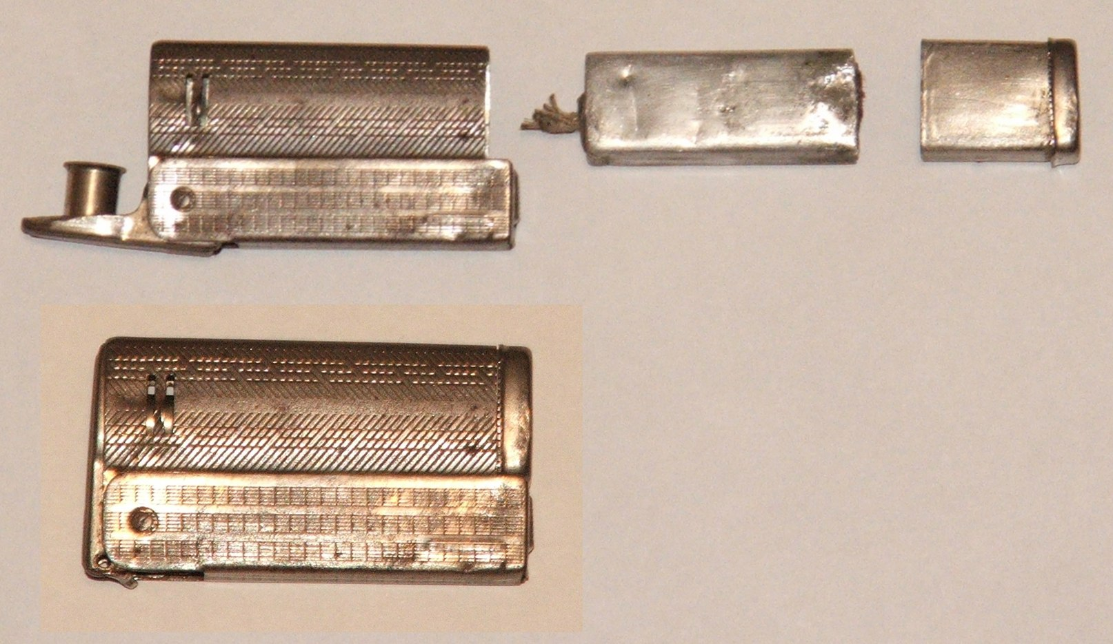 foto brichetă austriacă din colecția personală